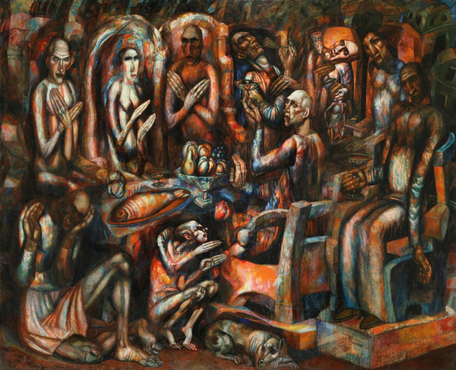 Пир королей 2013